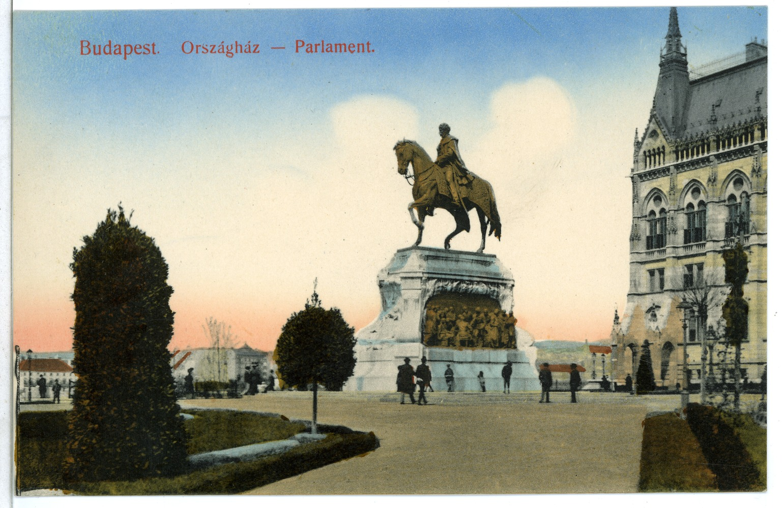 Budapest; Parlament This postcard is from publisher Brück & Sohn in Meißen ( This postcard has a unique number 09869 and is available in a higher resolution at the publisher. This images was uploaded in a cooperation project between Wikipedians and the publisher.